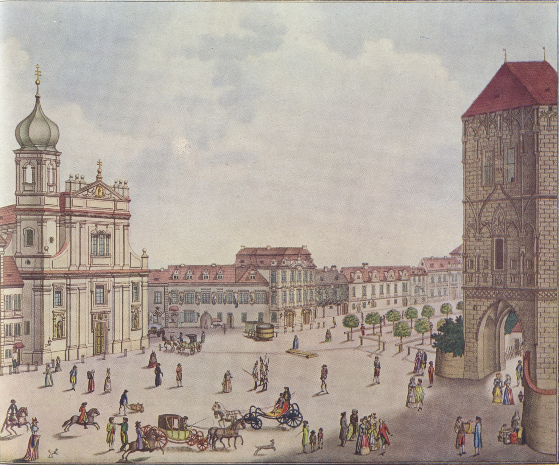 Filip a František Hegerové - Křižovatka u Prašné brány (1792)